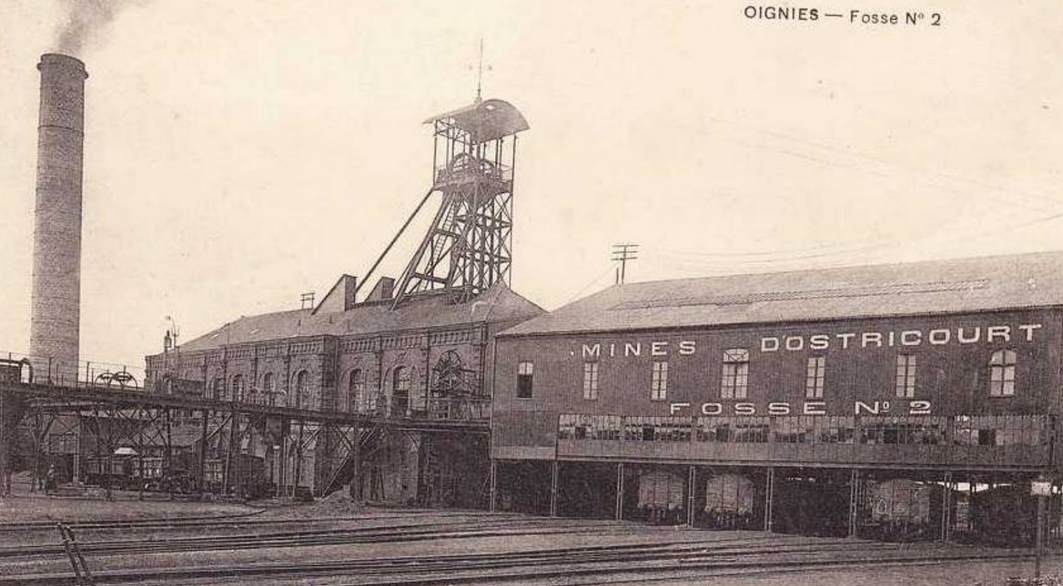 La Fosse n° 2 de la Compagnie des mines d'Ostricourt était un charbonnage constitué d'un seul puits situé à Oignies, Pas-de-Calais, Nord-Pas-de-Calais, France.